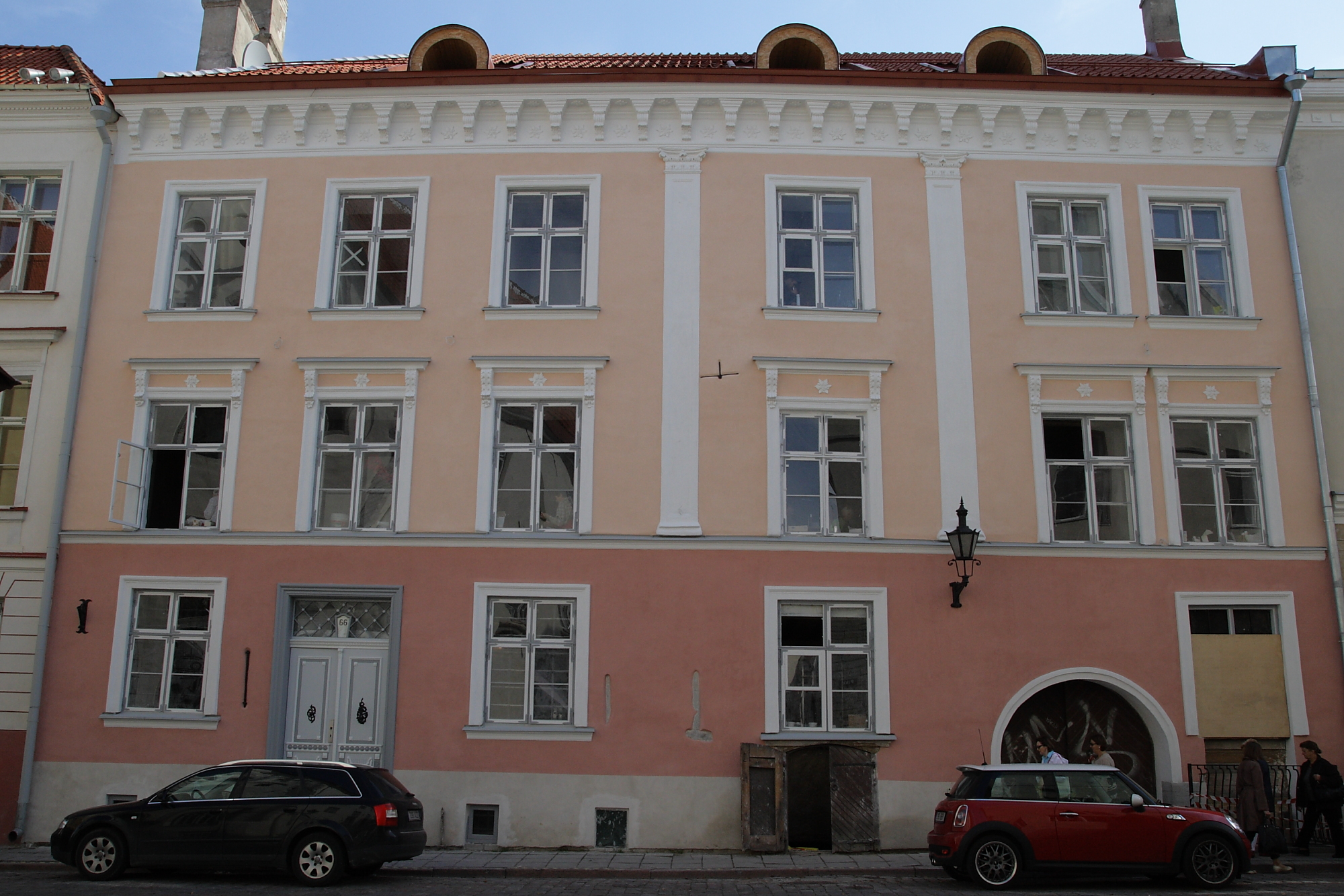 Tallinn, elamu Pikk 66, 14.-19.saj